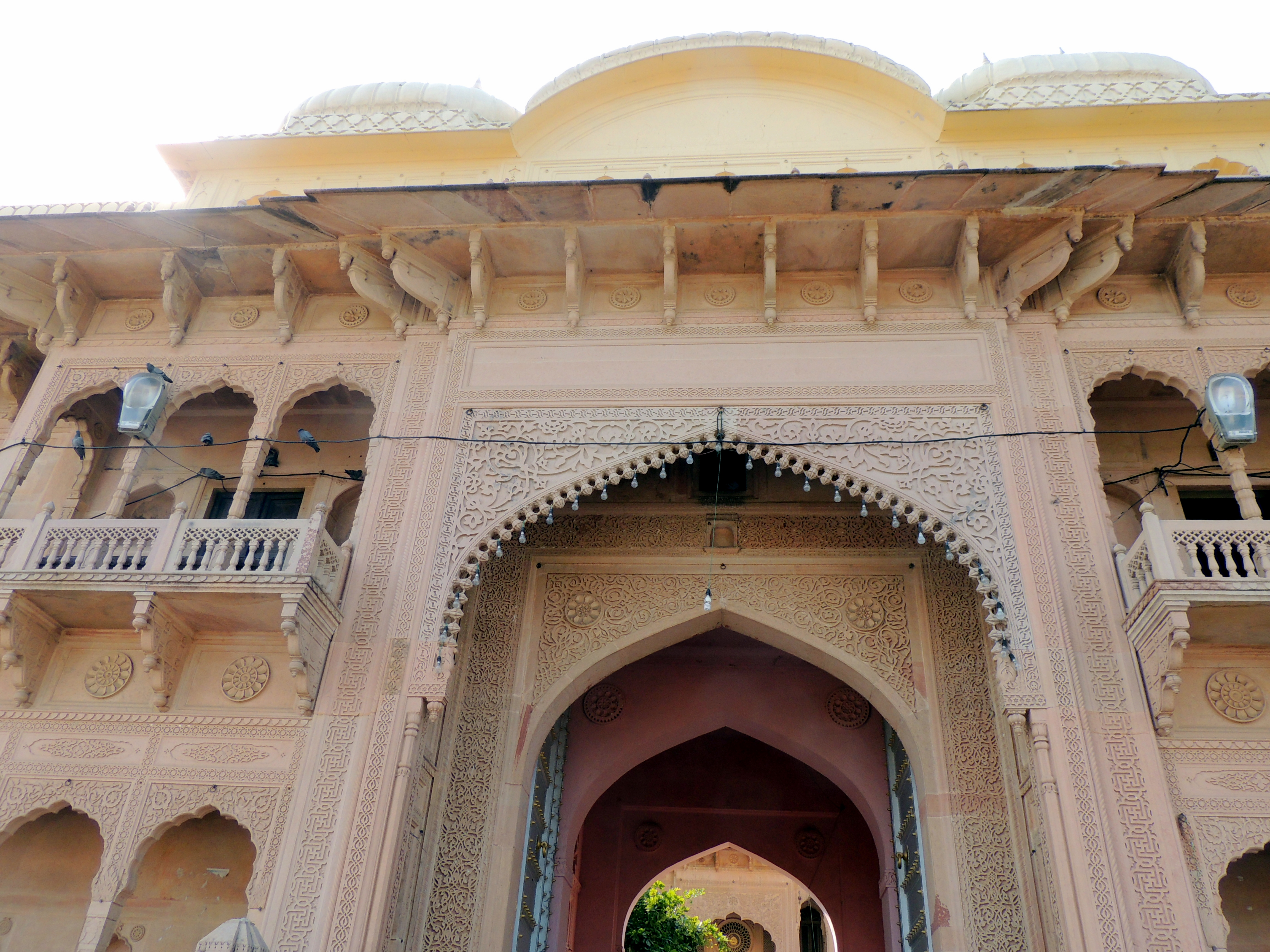 बरसाना में कुशल विहारी जी मंदिर का प्रवेशद्वार